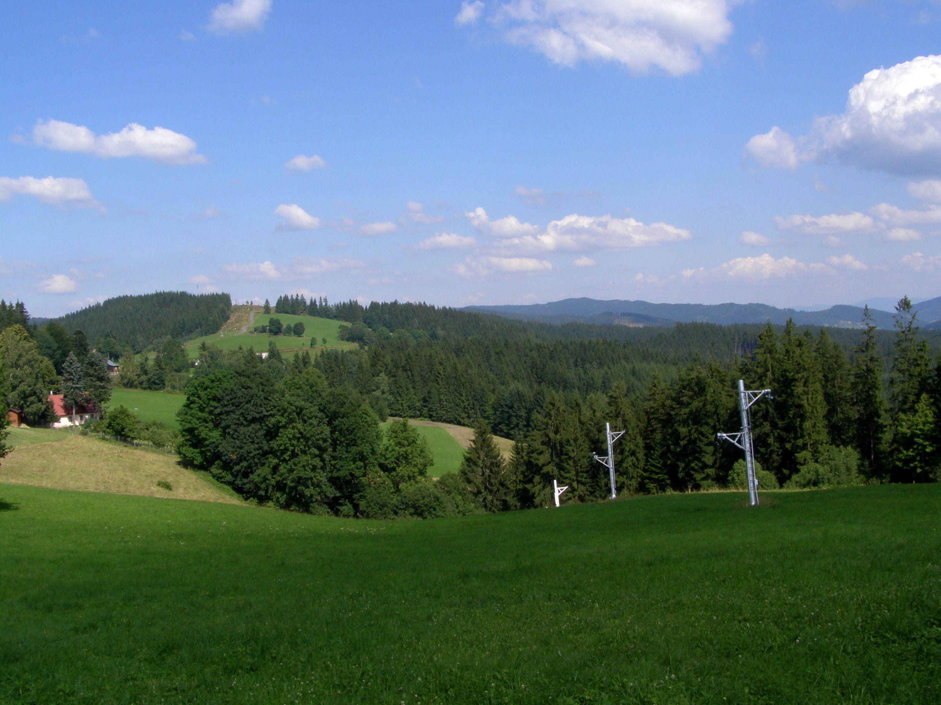 Gruň, výhled na hřeben z lokality Charbulák